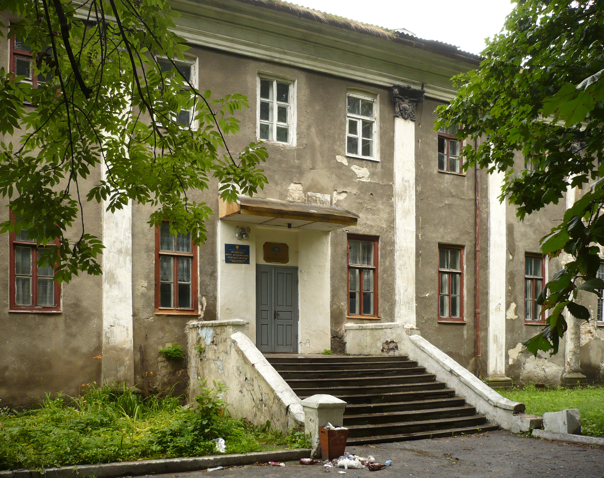 Pałac Potockich z poł. XVIII wieku w Brodach na Ukrainie